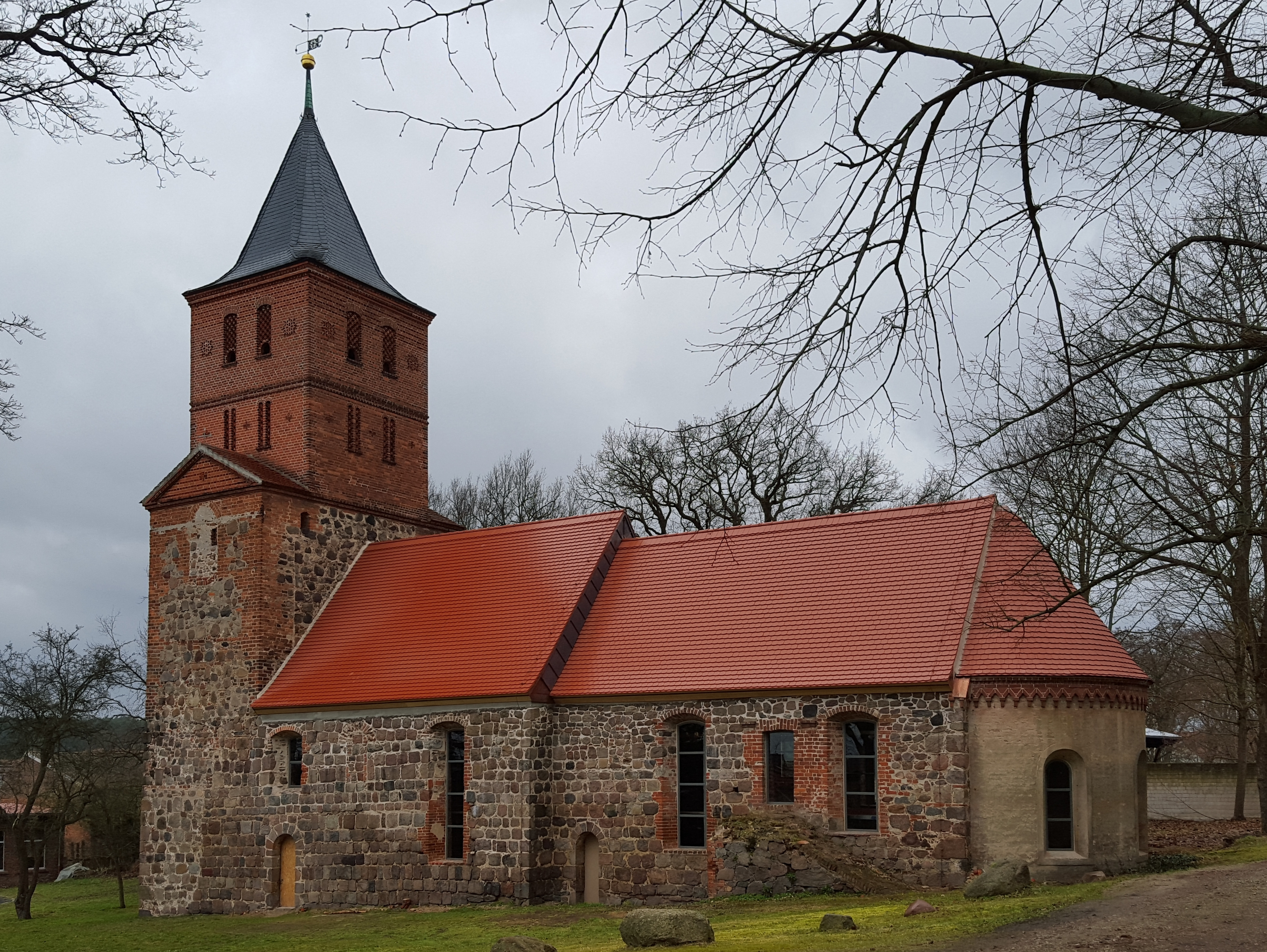 Dorfkirche Rogäsen im Februr 2016 nach Abschluss der Dachrekonstruktion